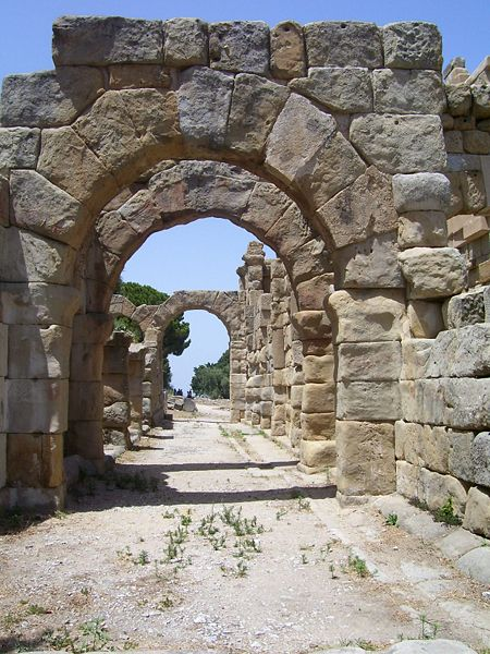 Tindari (Sicily)